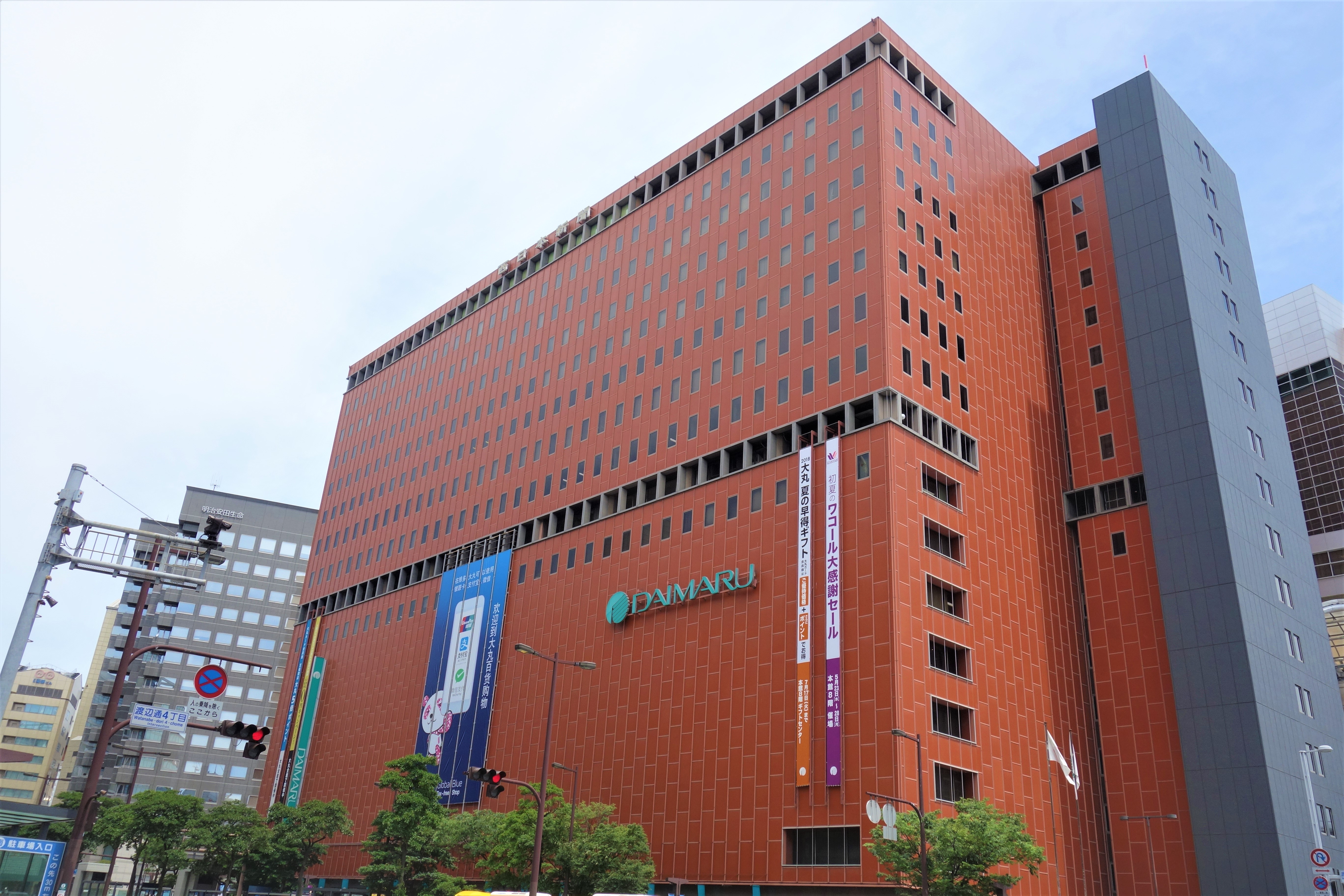 西日本新聞会館